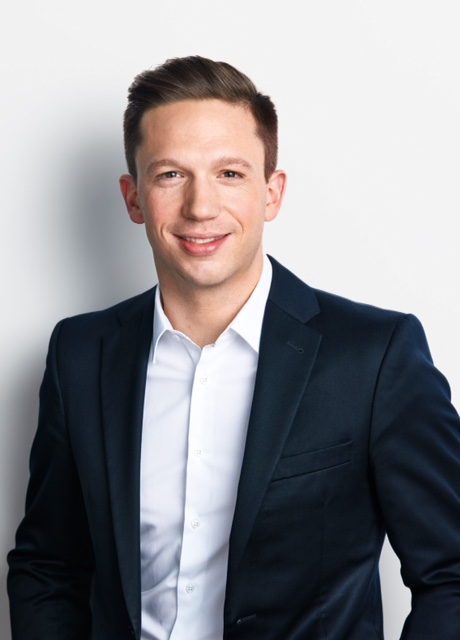 Falko Mohrs, 2017